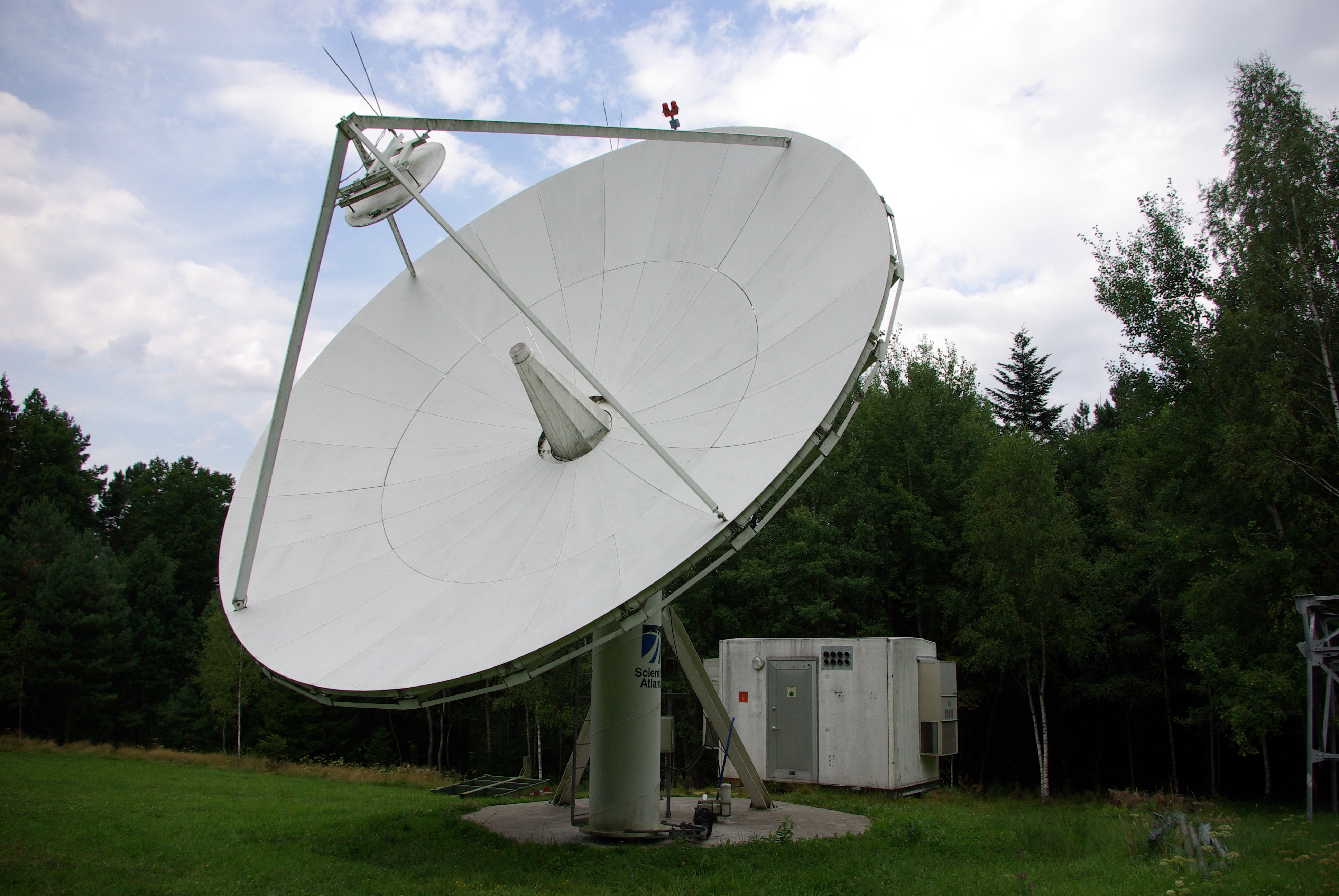 Radioteleskop RT-9 w Obserwatorium Astronomicznym Królowej Jadwigi w Rzepienniku Biskupim.